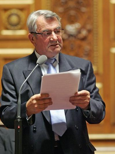 Photo du Sénateur Daniel Raoul